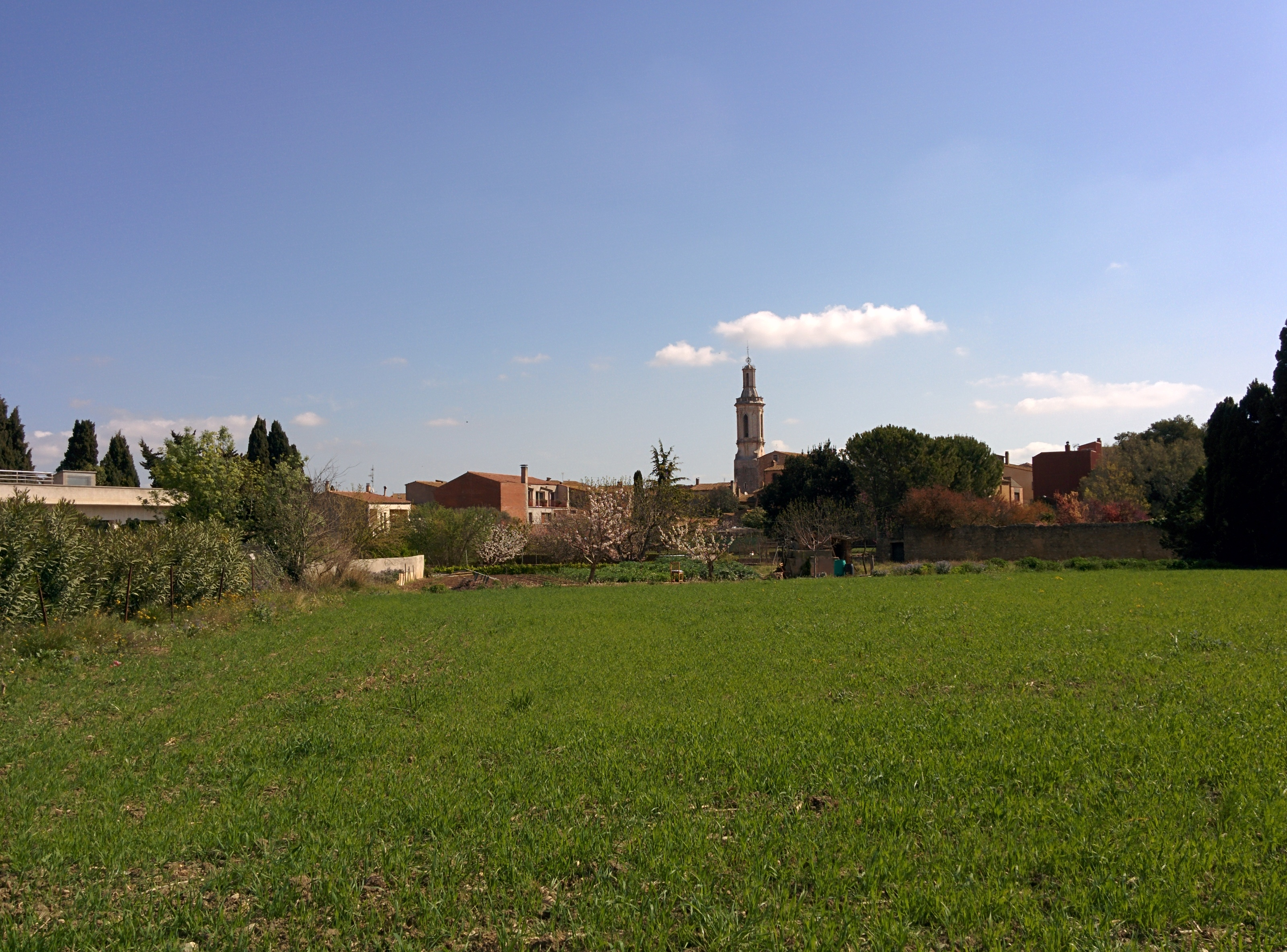 Església de Sant Andreu de Borrassà (Borrassà)